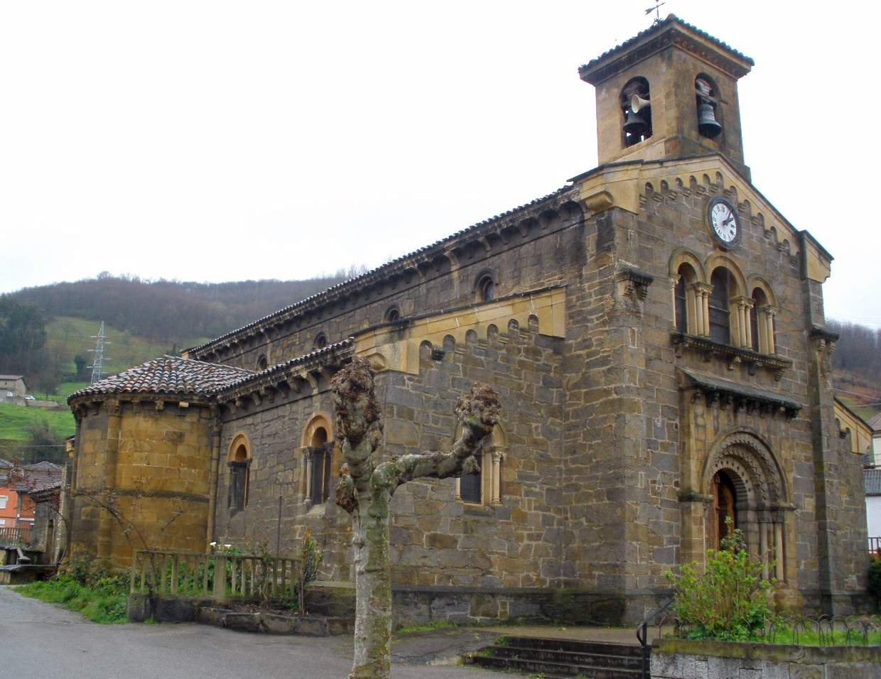 Iglesia de Santa Eulalia, o Santa Olaya, en Ujo, Mieres (Asturias)